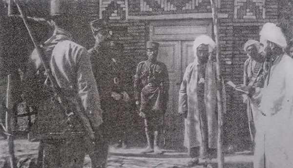 حاجی باباشیخ در دیدار سیف افشار (اعزامی رضاشاه پهلوی) ایالت غربی آذربایجان - قصبه بوکان